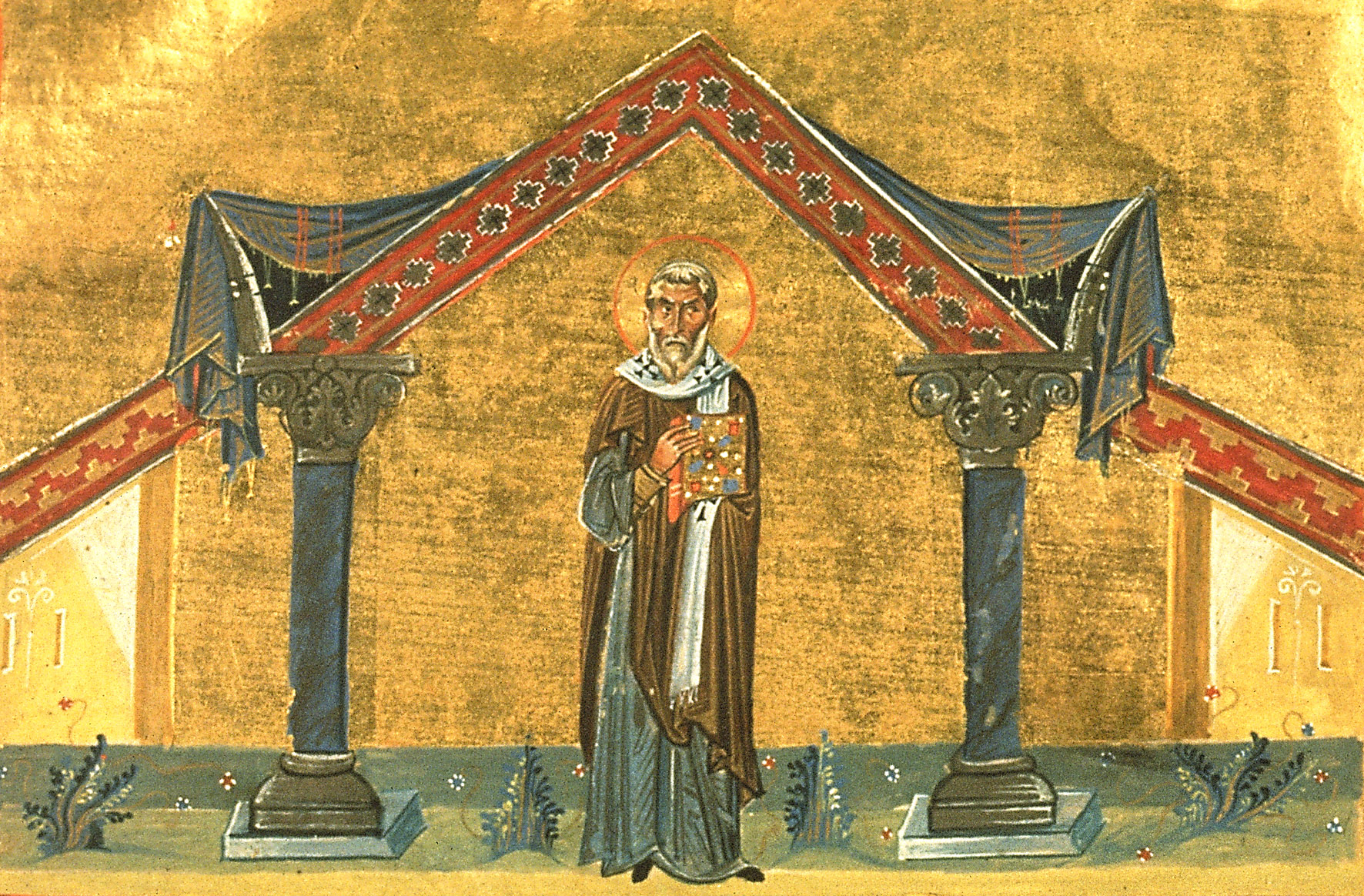 Прп. Агафон, папа Римский Константинополь. 985 г. Миниатюра Минология Василия II. Ватиканская библиотека. Рим.